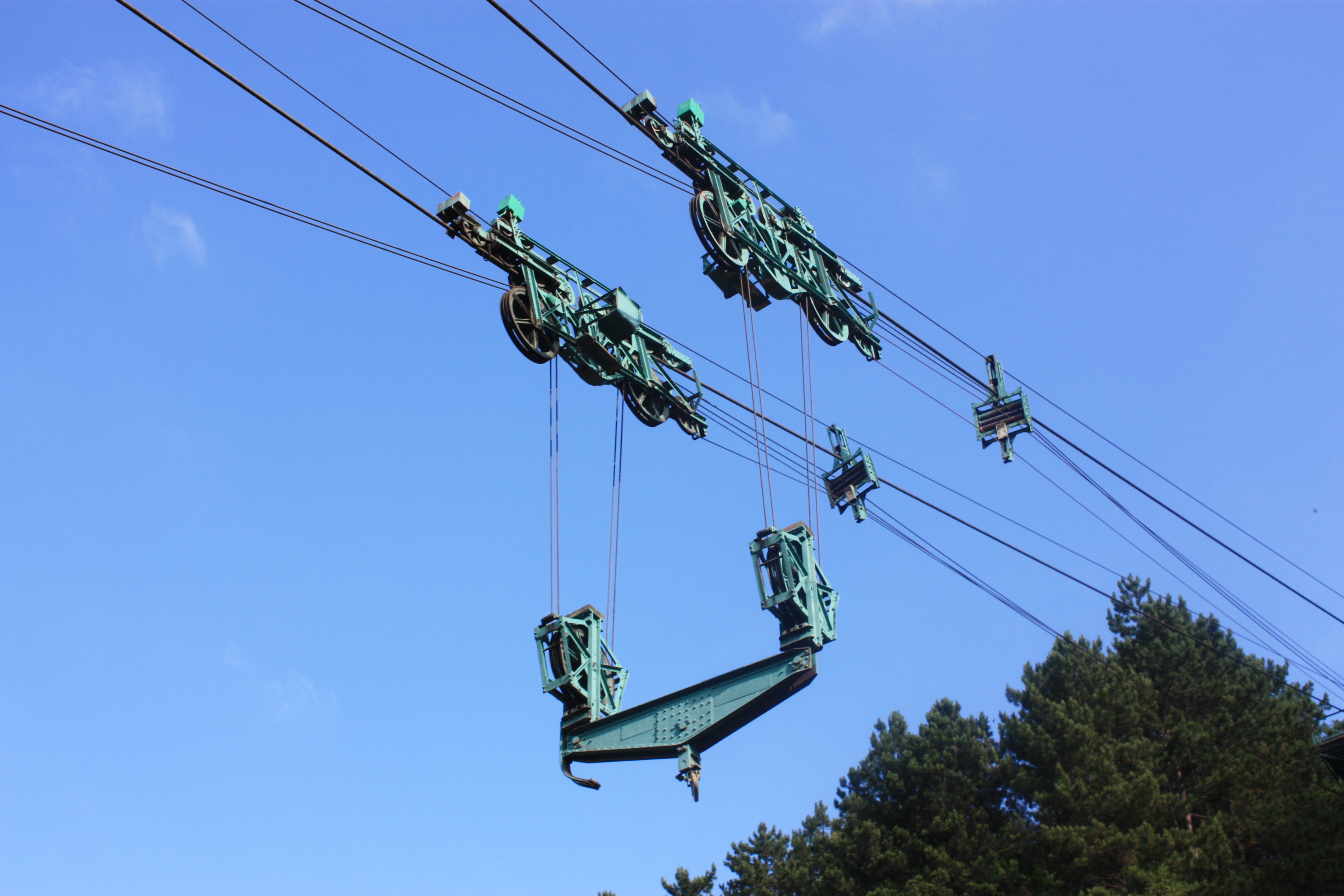 Un blondin à proximité du barrage du Sautet, Isère, Rhône-Alpes, France.